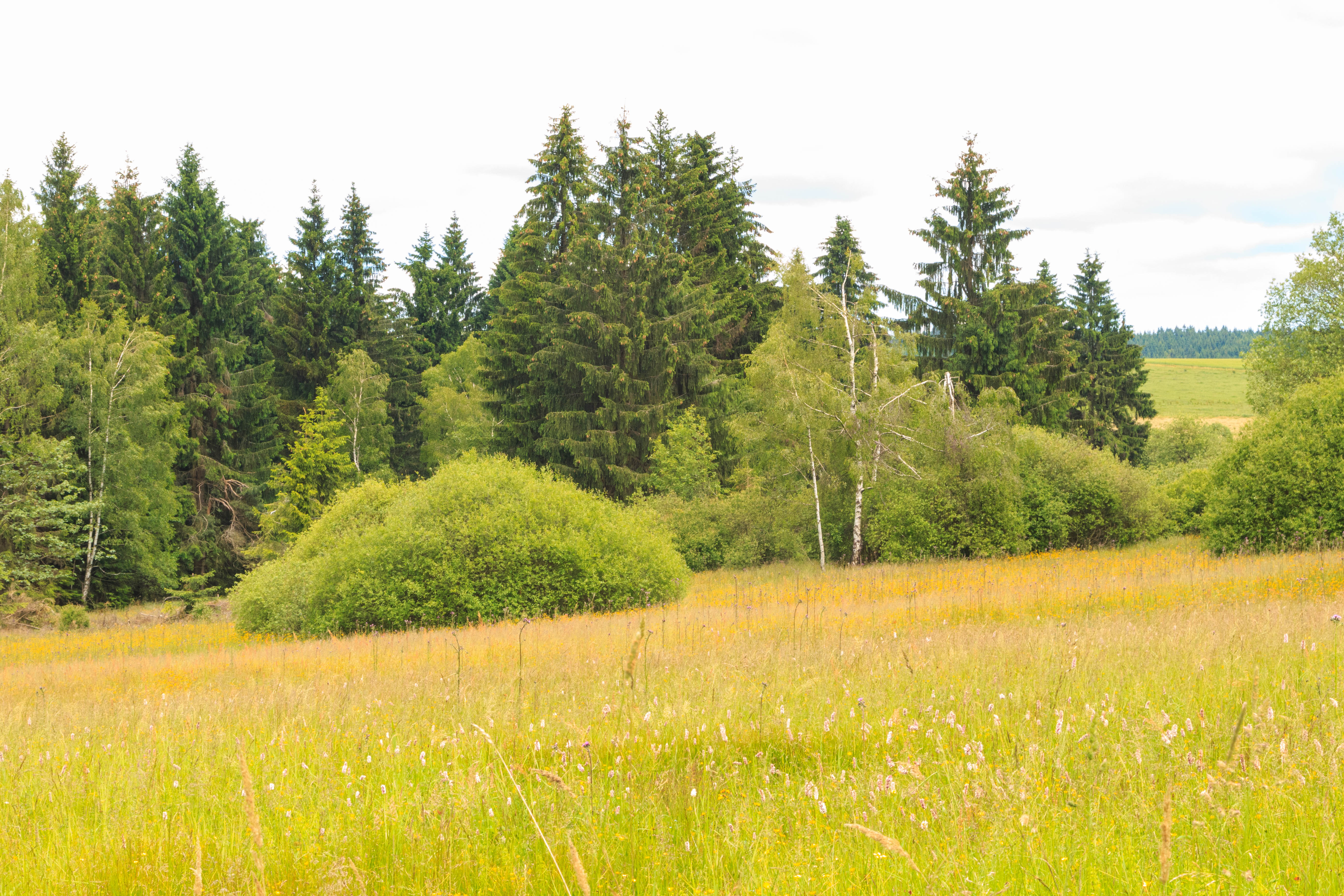 Přírodní památka Sklenské louky Project: Chráněná území.